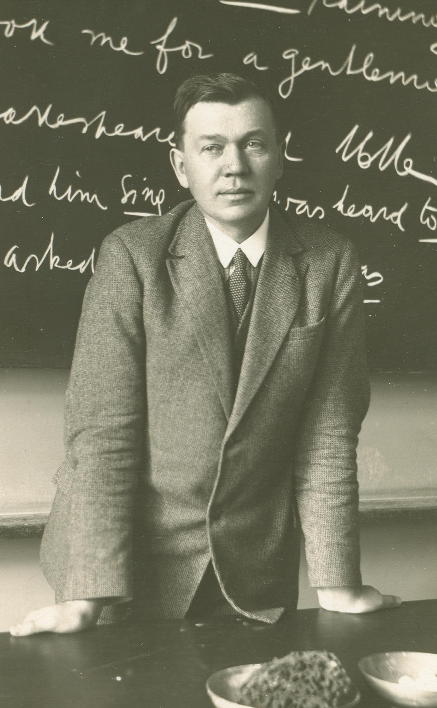 Antonín Osička (1888 - 1949), Český anglista, básník a prozaik.